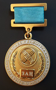 Нагрудный знак "За вклад в развитие юстиции"